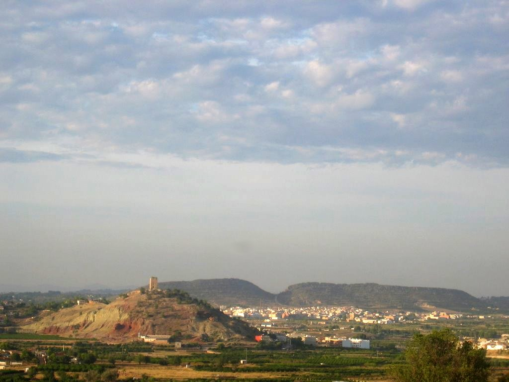 Vista de la torre de Montroi des de lluny